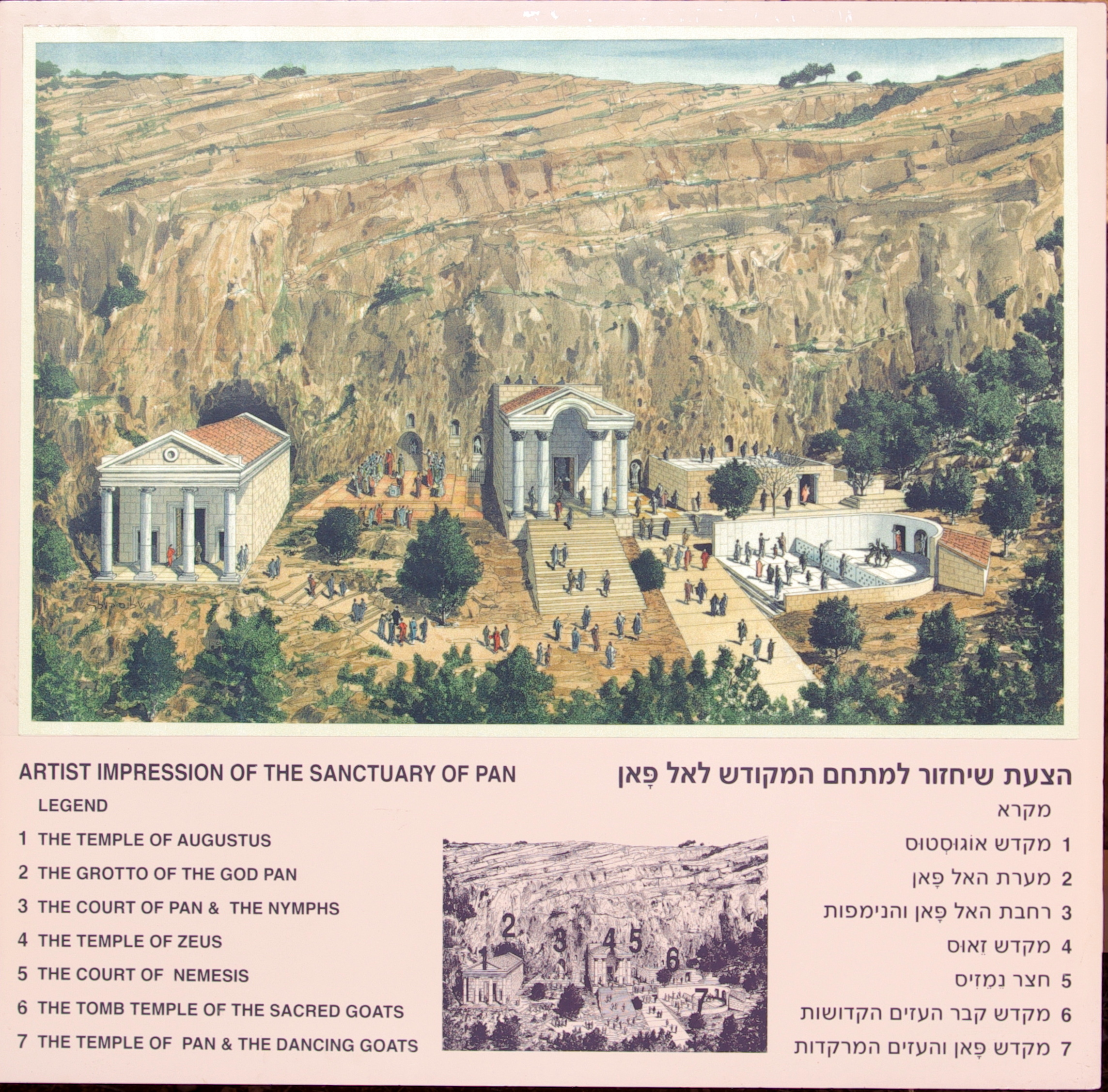 Tafel mit Rekonstruction des Heiligtums